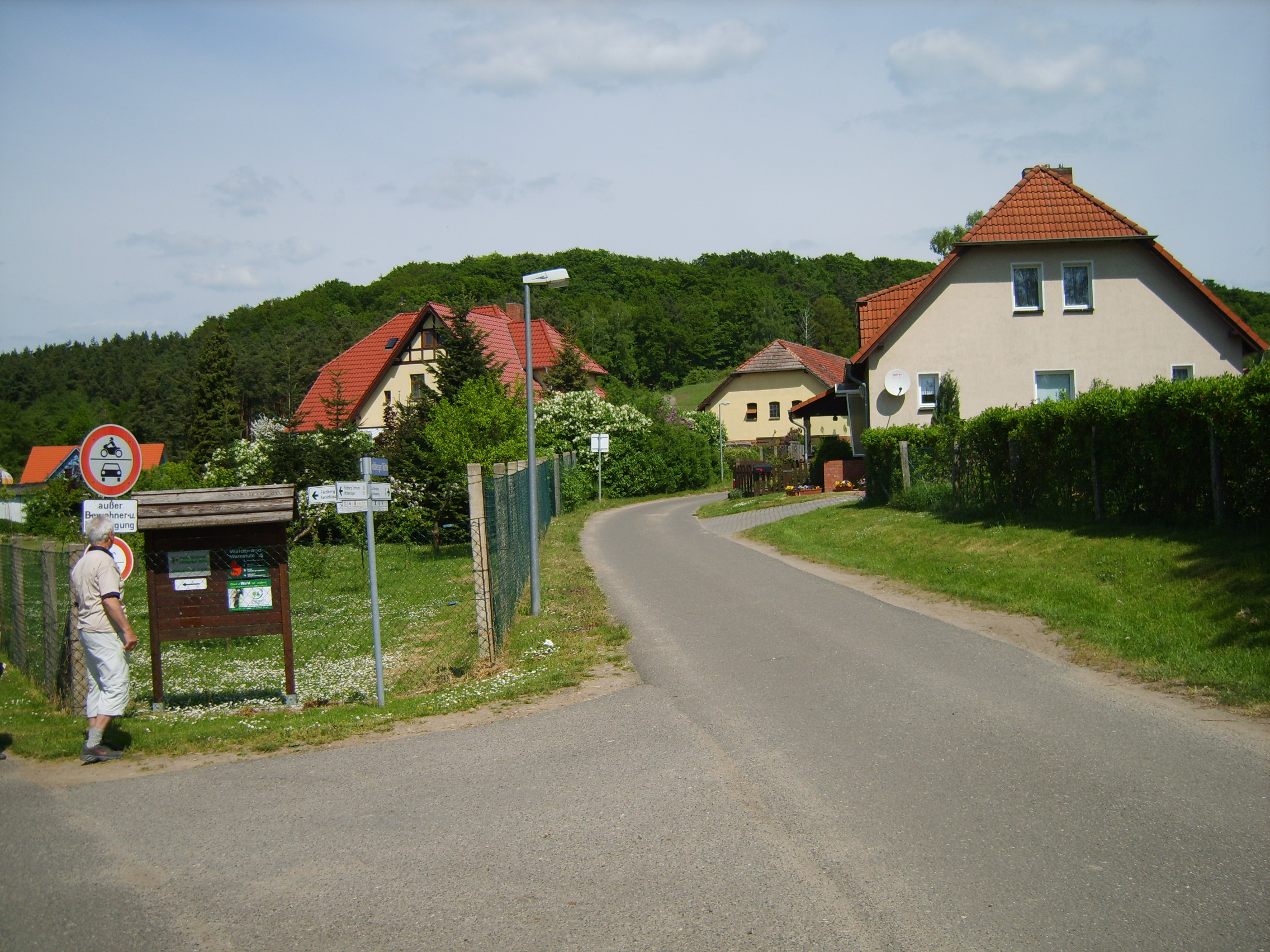 OT Feldberger Hütte - hinten Reiherberg